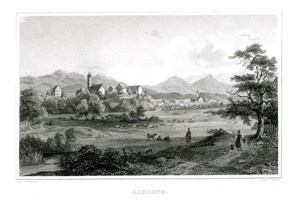 “Aibling”, Stahlstich